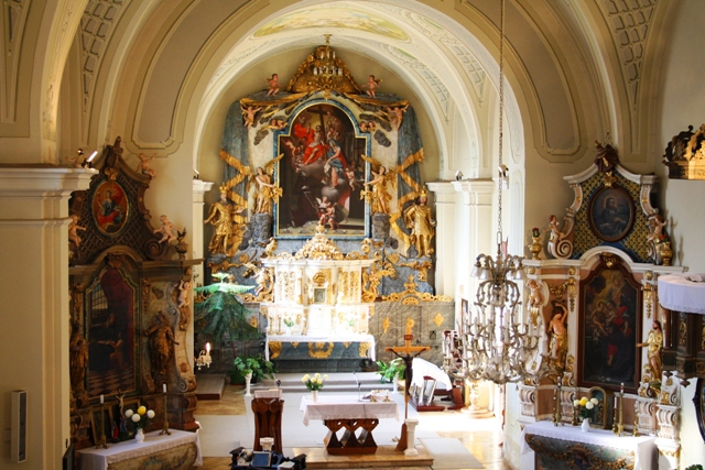 A szendrői barokk stílusú Assisi Szent Ferenc Római Katolikus Templom szentélye.